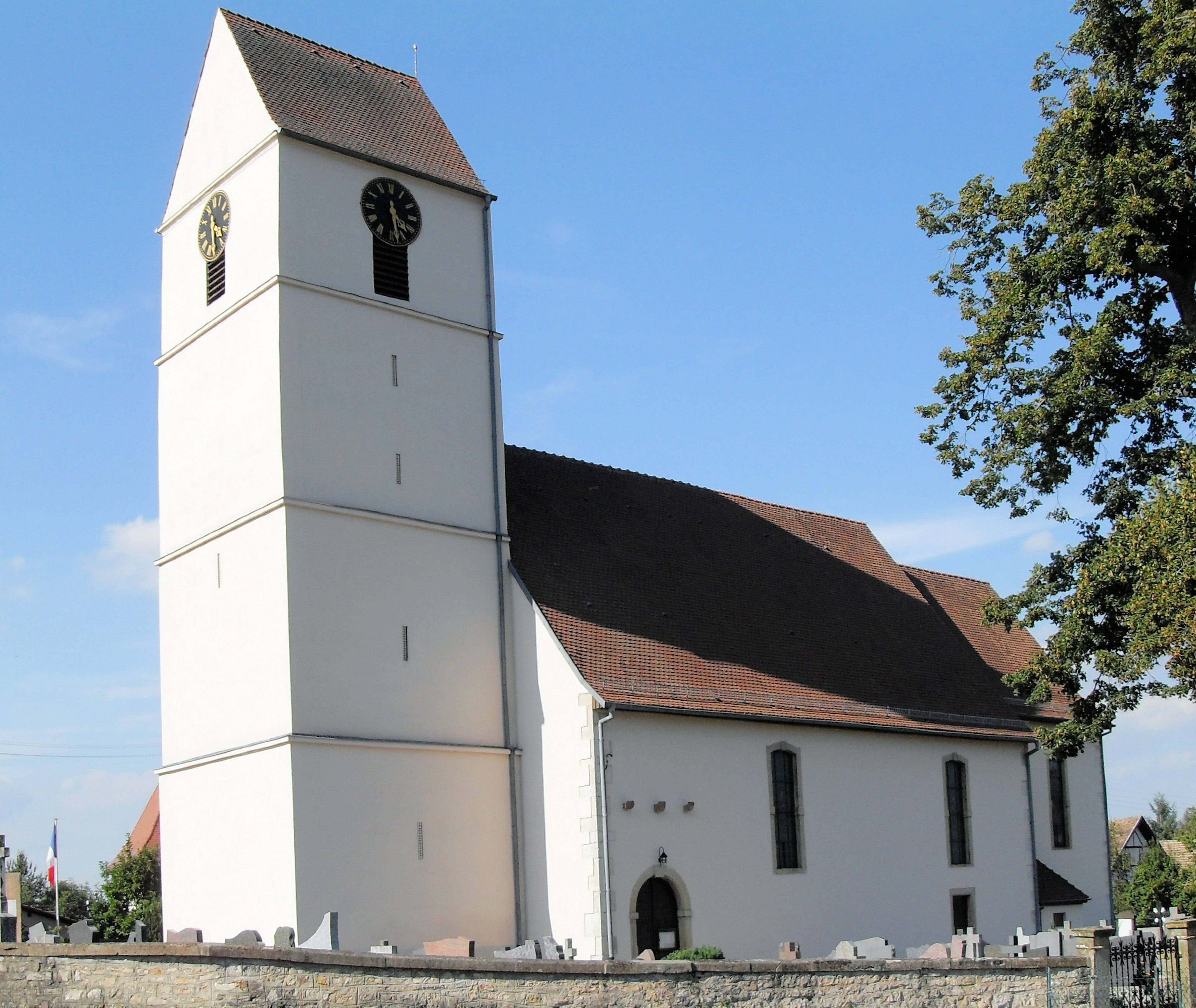 L'église Saint-Léger à Kœstlach